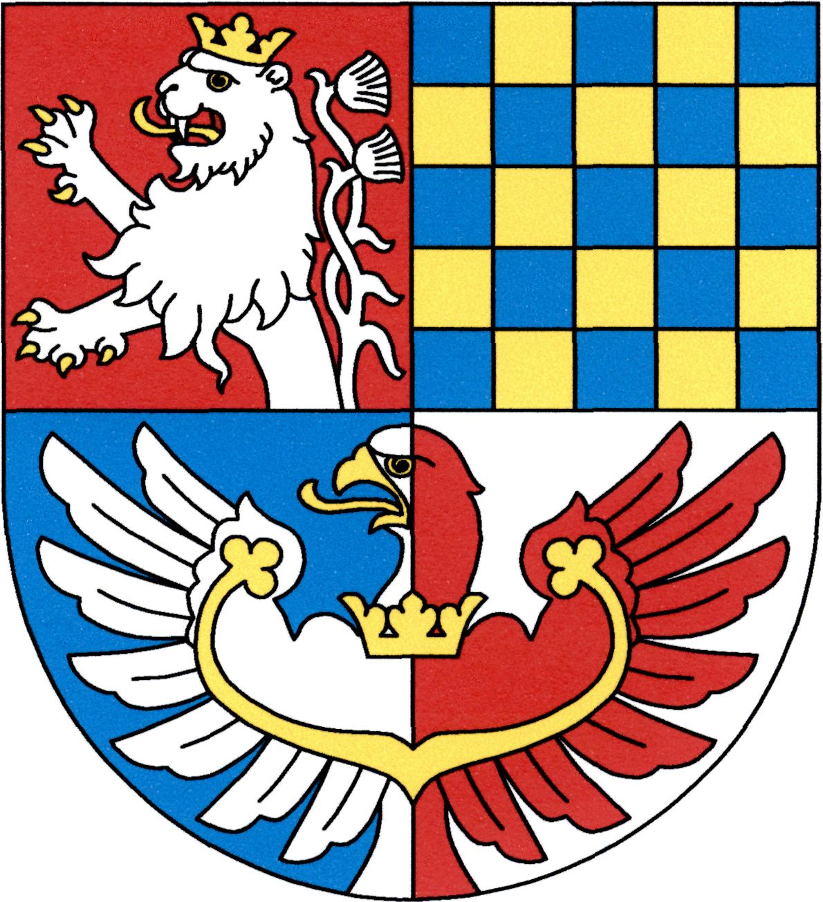 Znak obce Pnětluky